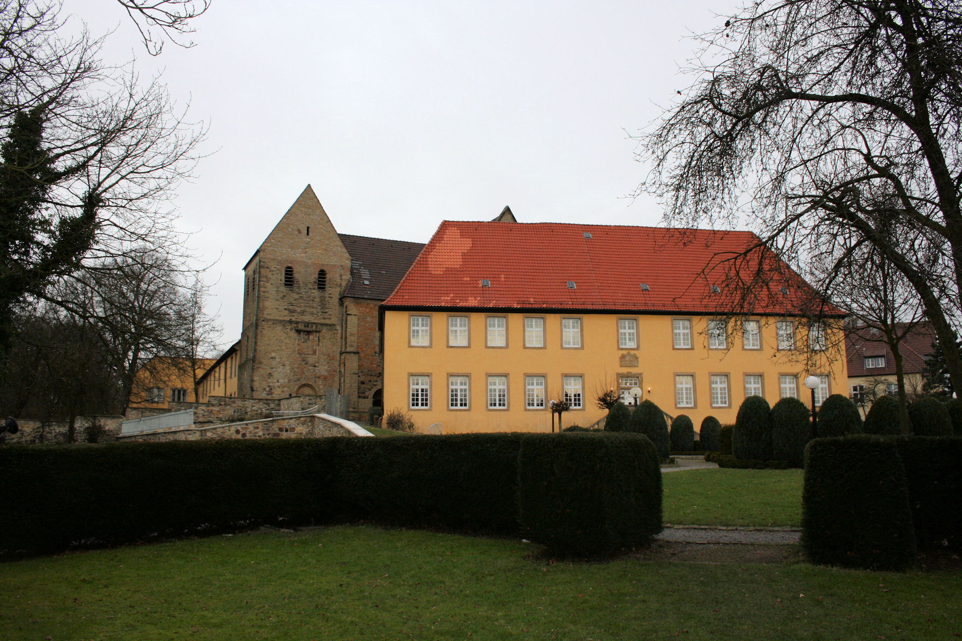 Gebäude der Klosteranlage Gertrudenberg